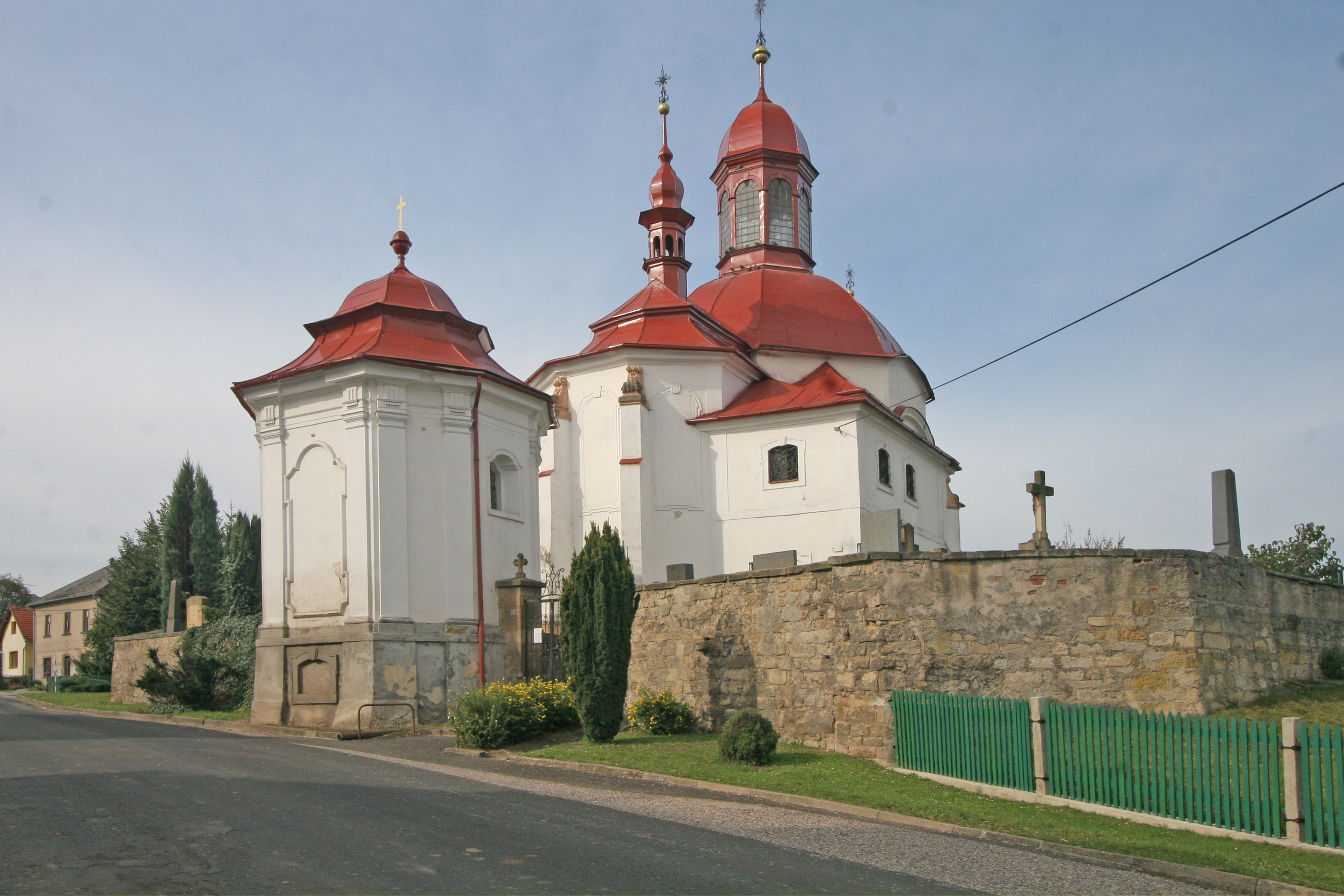 Kostel Nanebevzetí P. Marie (Slatiny), Slatiny